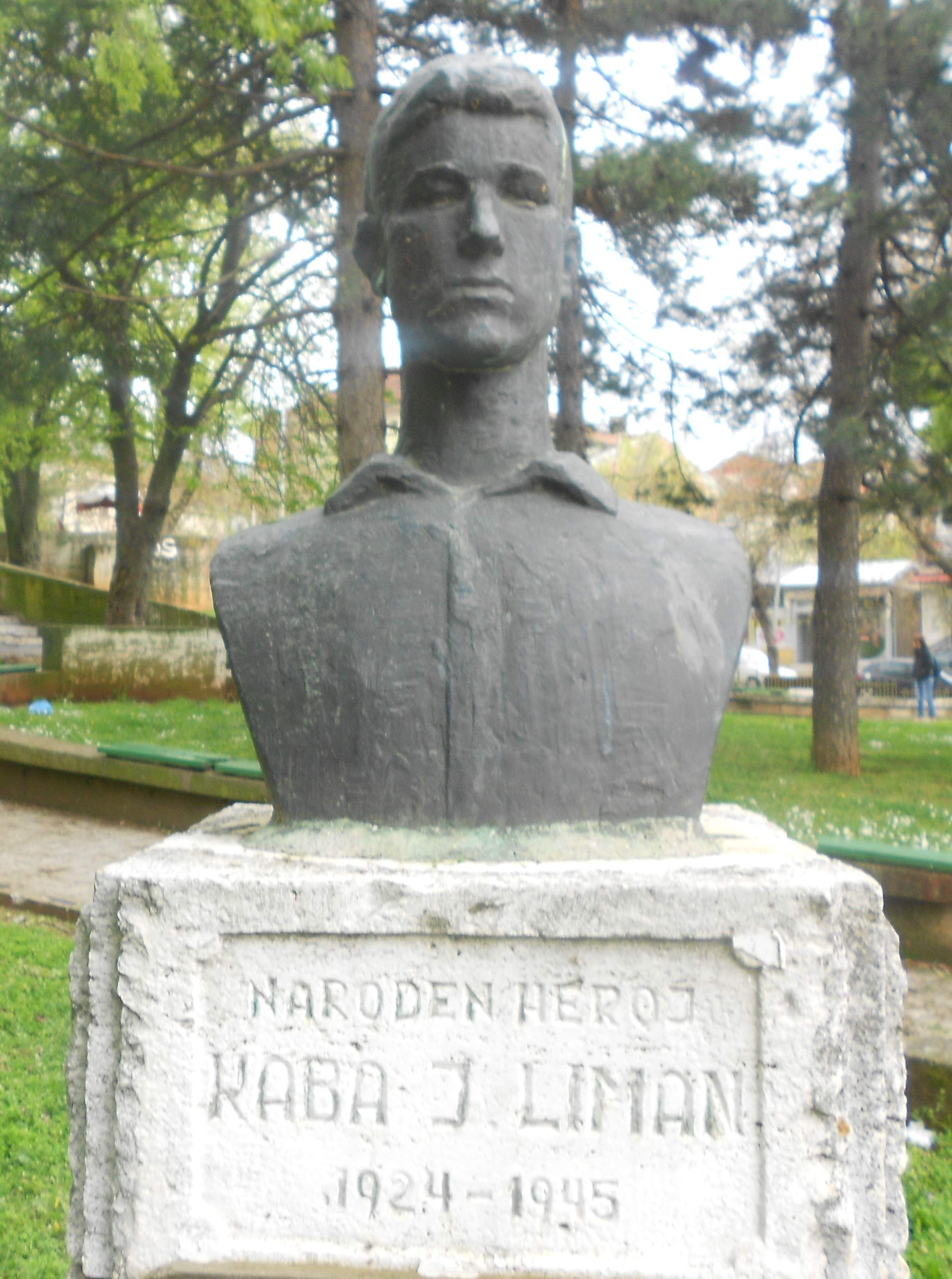 Биста на Лиман Каба во Дебар